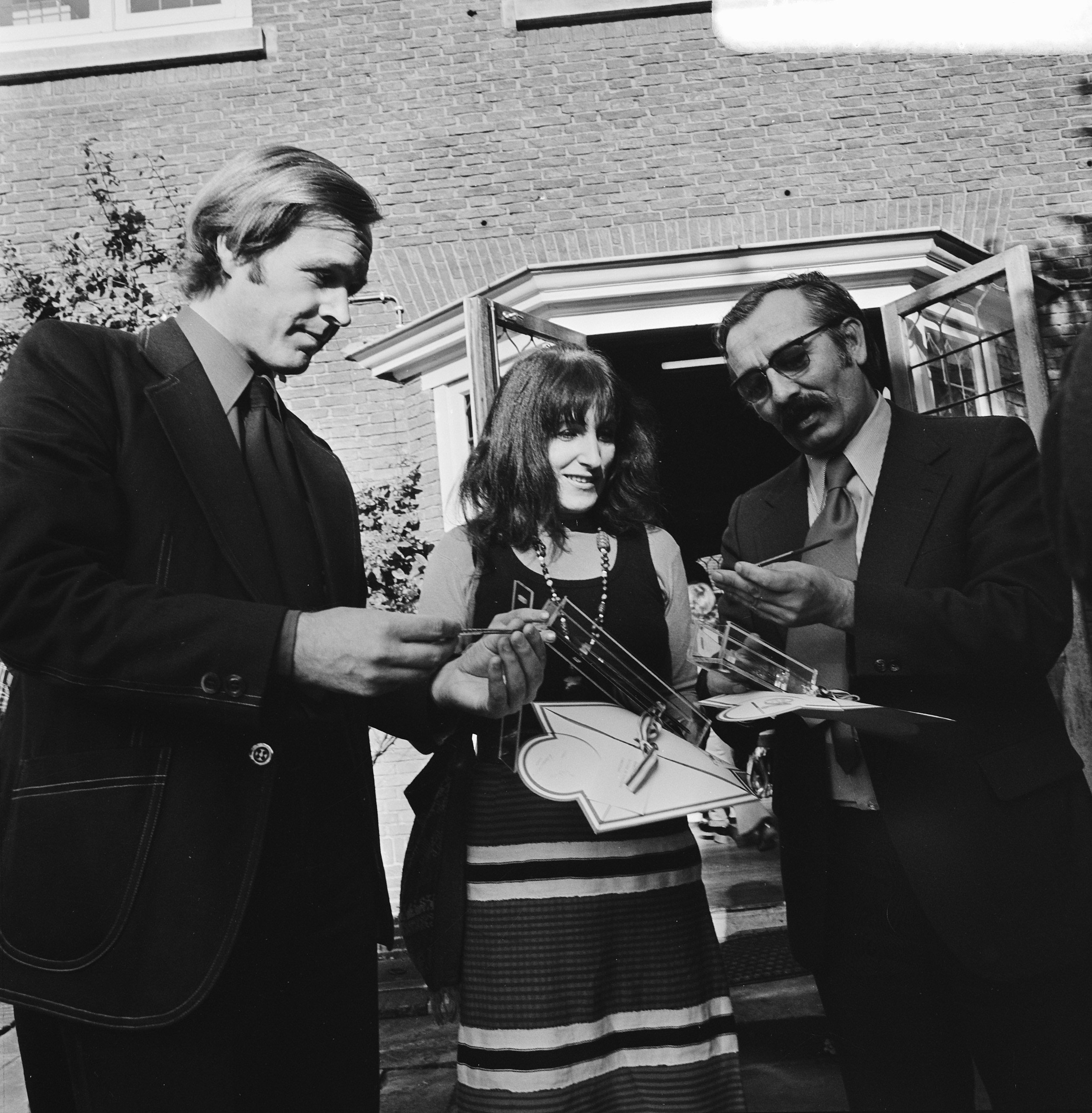 Collectie / Archief : Fotocollectie Anefo Reportage / Serie : Uitreiking van de Gouden Griffels en het Gouden Penseel in het Singermuseum door staatssecretaris Meijer van CRM Beschrijving : V.l.n.r. Jan Terlouw, Margriet Heymans en Henk Barnard met hun onderscheidingen Datum : 27 oktober 1973 Locatie : Laren, Noord-Holland Trefwoorden : literatuurprijzen, prijsuitreikingen, schrijvers Persoonsnaam : Barnard, Henk, Heymans, Margriet, Terlouw, Jan Fotograaf : Mieremet, Rob / Anefo Auteursrechthebbende : Nationaal Archief Materiaalsoort : Negatief (zwart/wit) Nummer archiefinventaris : bekijk toegang 2.24.01.03 Bestanddeelnummer : 926-7871